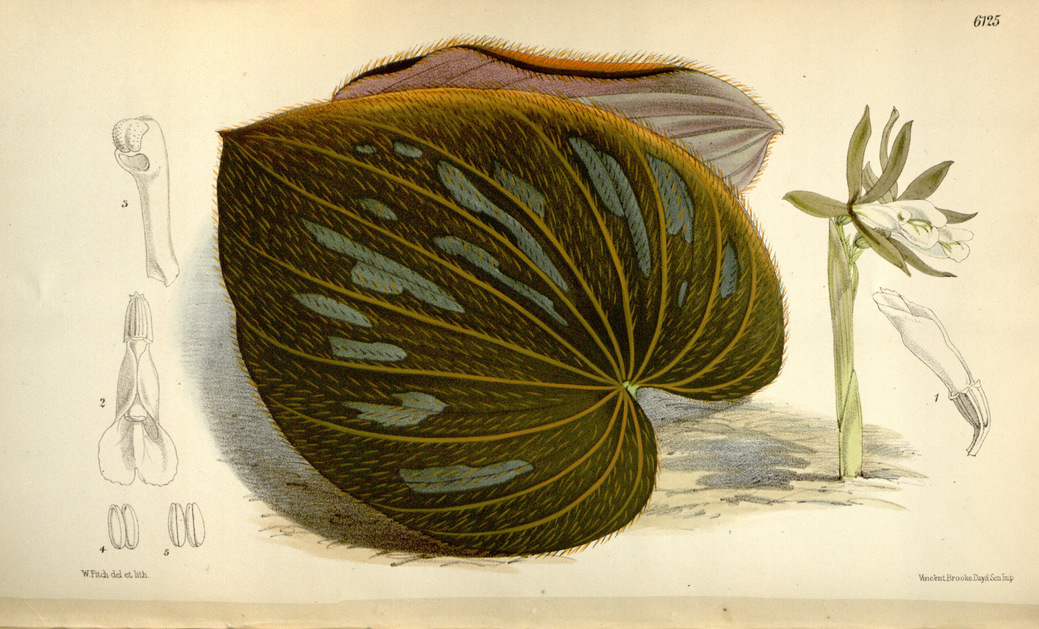 Illustration of Nervilia plicata (as syn. Pogonia discolor)